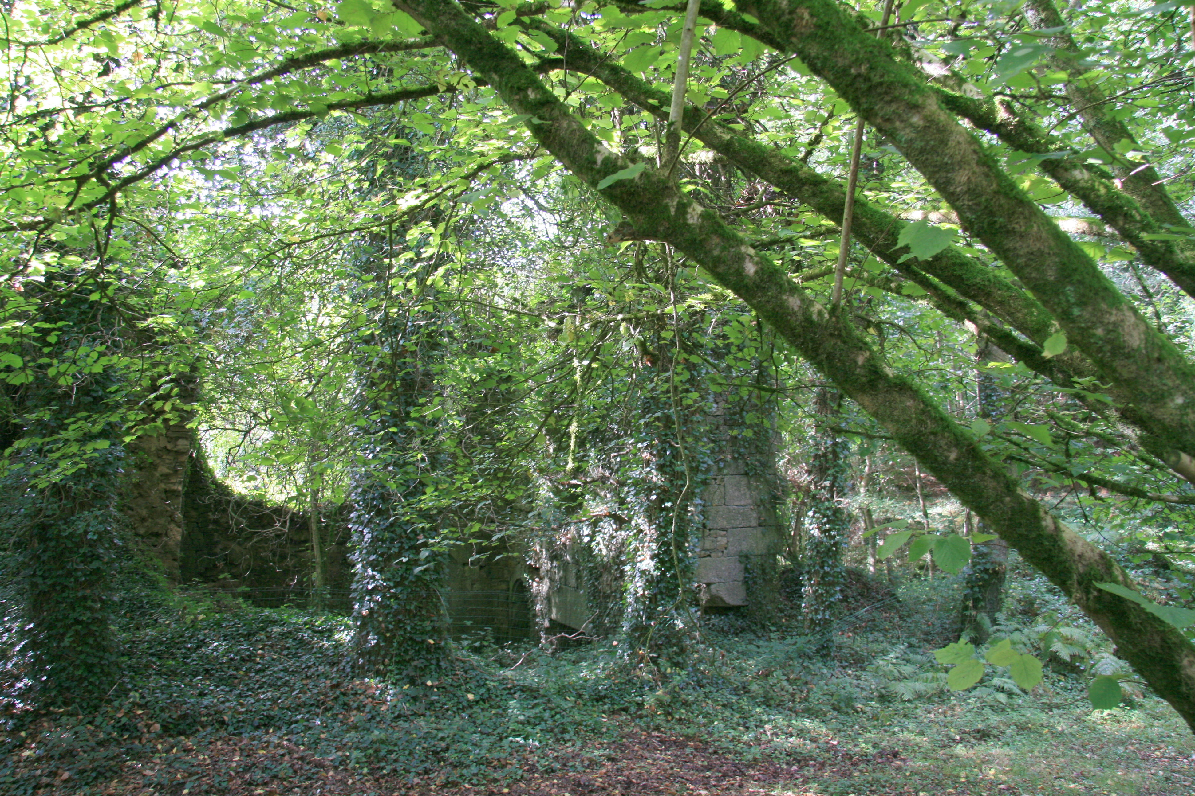 Ruines du château de Beaucours - 22480 Saint Nicolas du Pélem